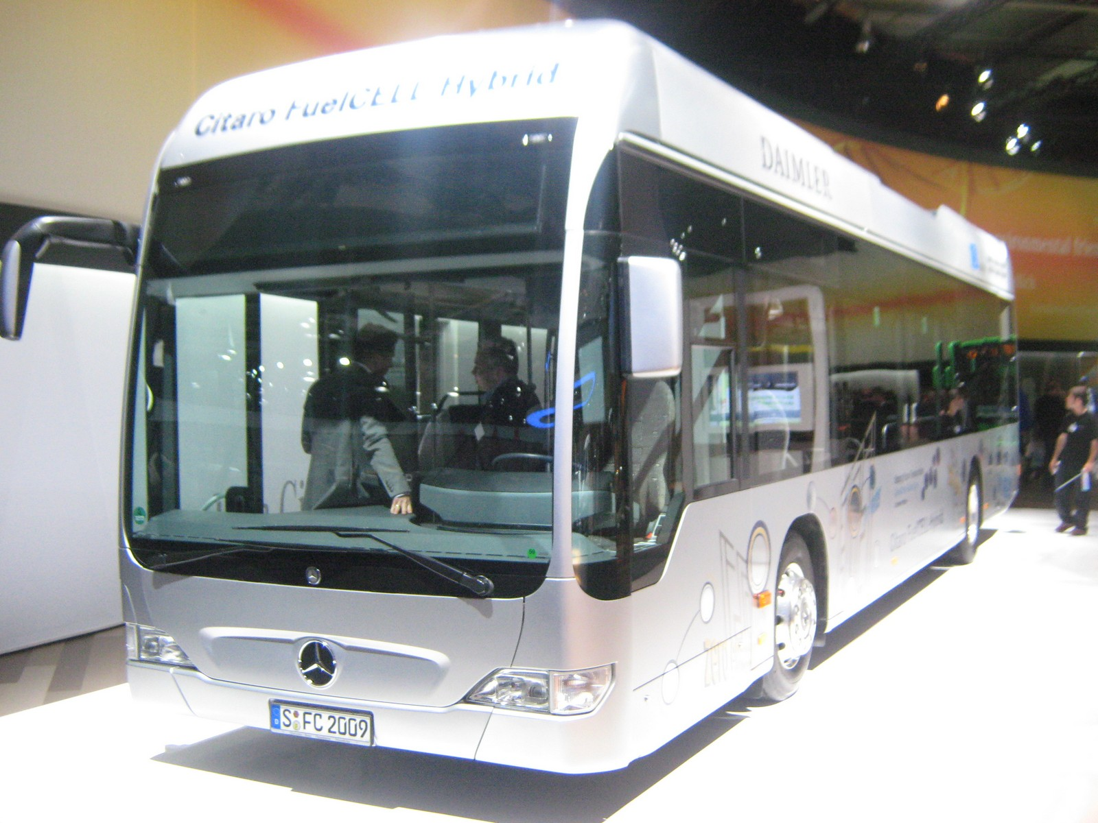 Internationale Automobilausstellung für Nutzfahrzeuge in Hannover 2010